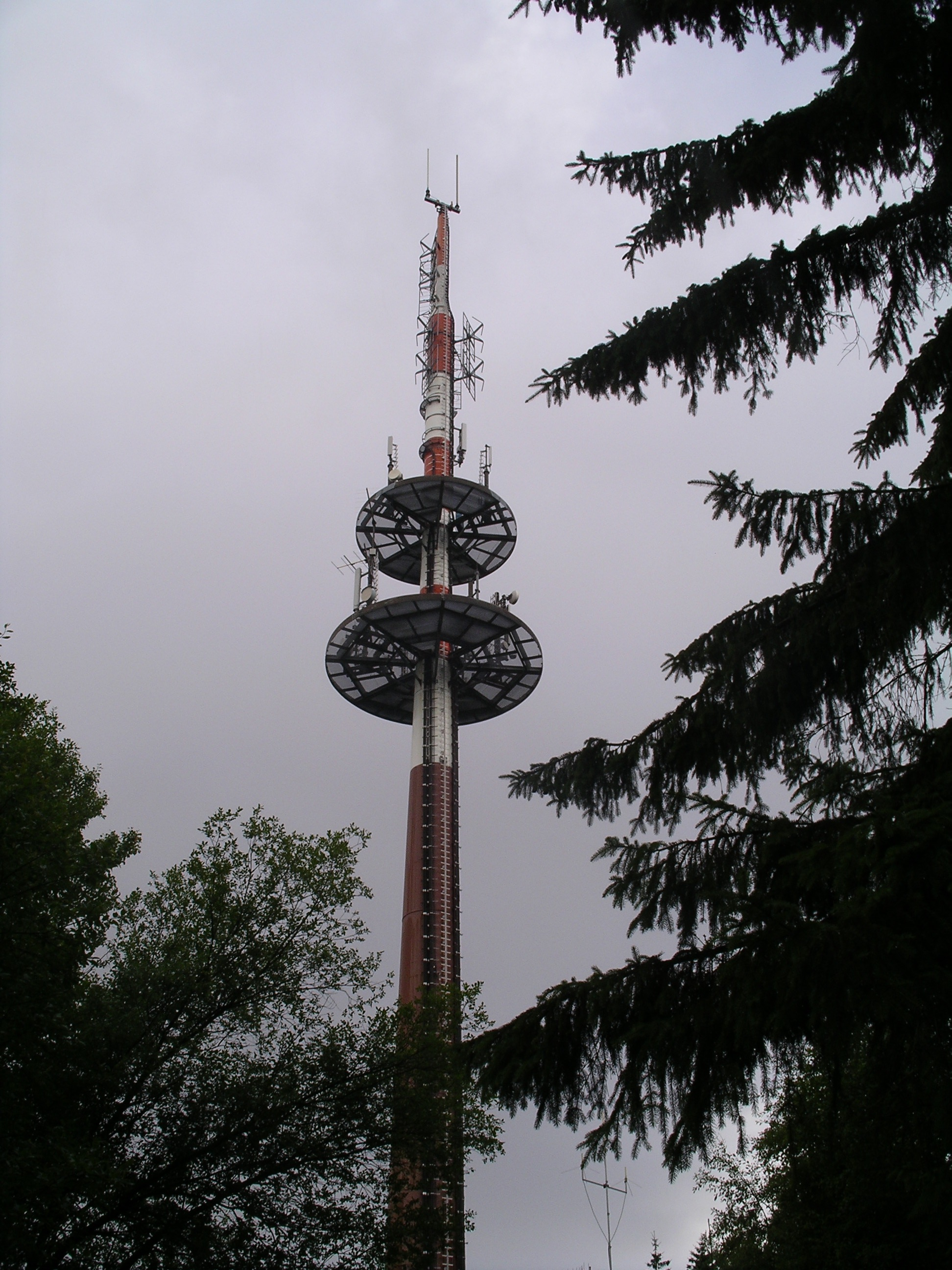 Sendemast der Sendeanlage Suhl-Erleshügel